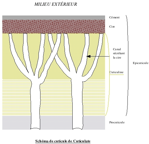 Schéma simplifié de cuticule de cuticulate Image dessinée par Teuteul d'après bibliographie et cours université; libre de droit.